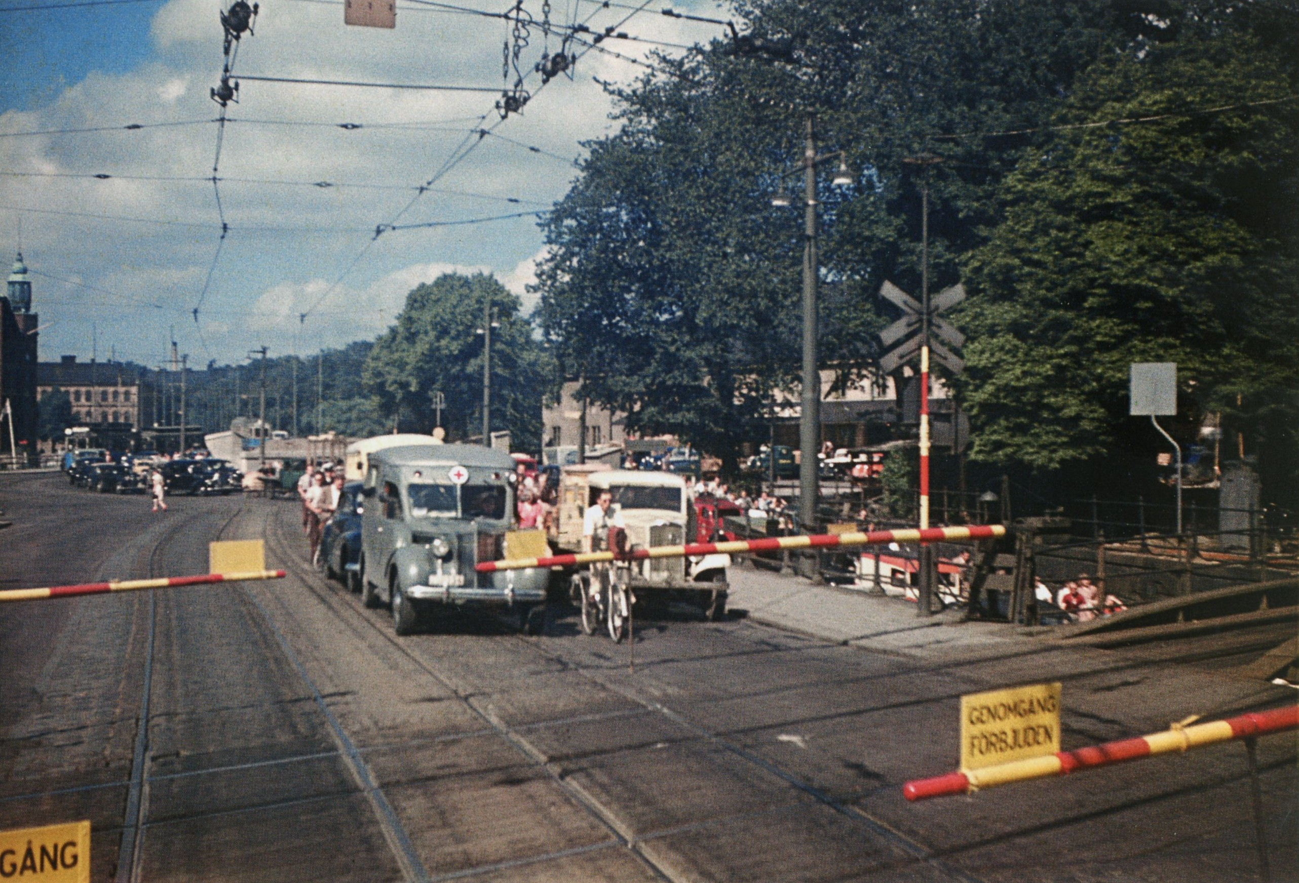 Tegelbacken 1940-tal, "Tegelbackselendet" med lång trafikkö bakom nedfällda järnvägsbommar